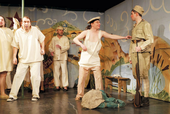 Цветы Театр чонкин